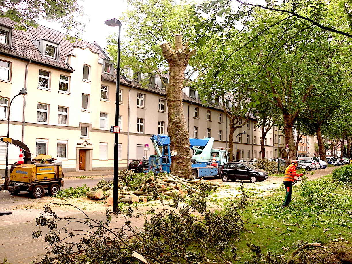 Платановая аллея на Госпиталь-штрассе, Бенрат. Охраняется законом.